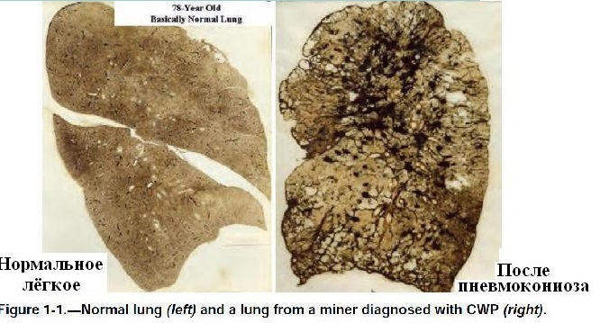 Обеспыливание при добыче угля в шахах США. Фиг. 1.1 Лёгкое нормального человека и человека, болевшего пневмокониозом